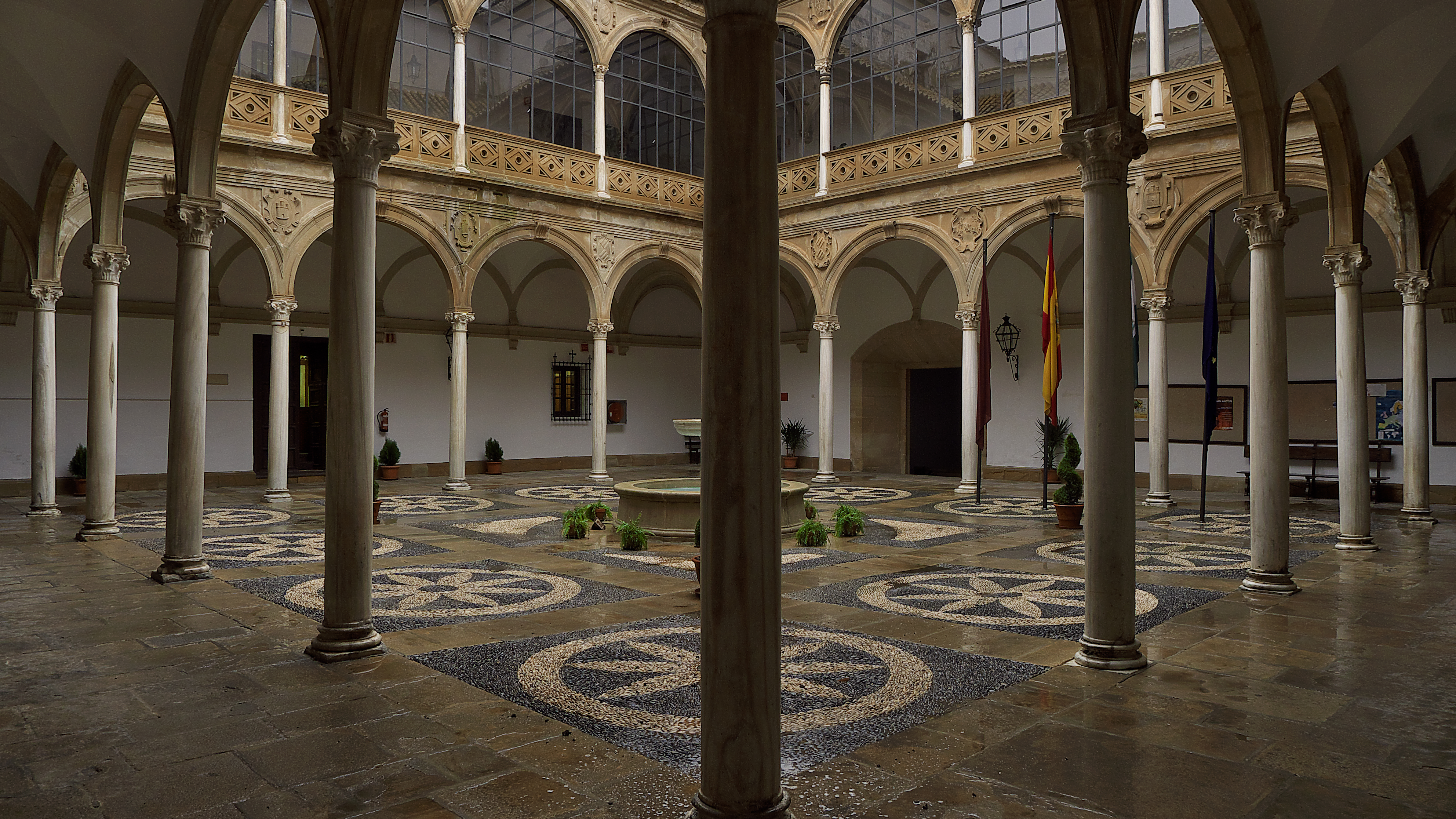 El ubetense Juan Vázquez de Molina, Secretario de Estado de Carlos I de España y de Felipe II de España, sobrino de Francisco de los Cobos y Molina, contrata a Andrés de Vandelvira la construcción de su palacio en Úbeda (1560-1566)